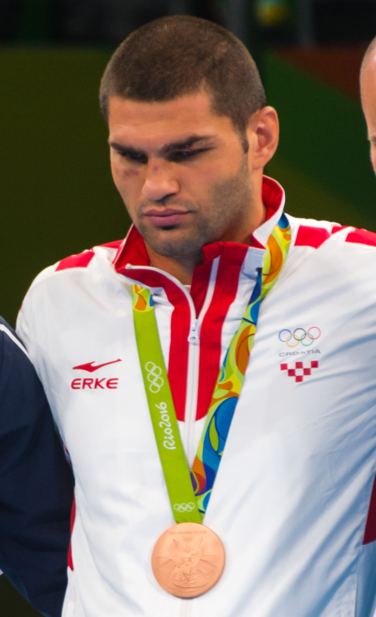 Pódio da categoria peso superpesado acima de 91kg masculino, Jogos Olímpicos Rio 2016. Ouro: Tony Victor James Yoka/FRA. Prata: Joe Joyce/GBR. Bronzes: Filip Hrgovic/CRO e Ivan Dychko/KAZ.